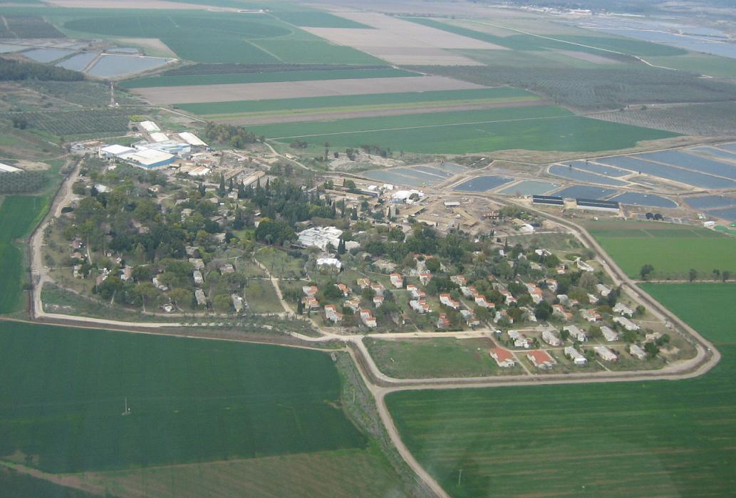 טירת צבי. צילום אוויר לכיוון צפון רישיון נוצר על ידי משתמש:אסף.צ